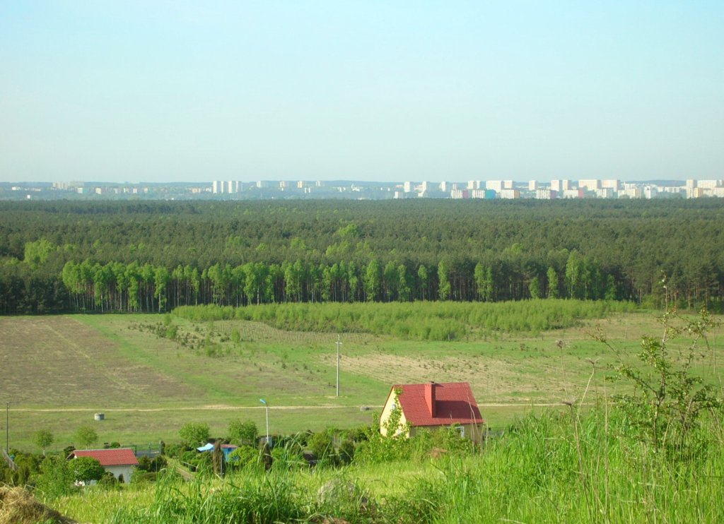 Widok Lasu Gdańskiego ze Zbocza Fordońskiego w Bydgoszczy